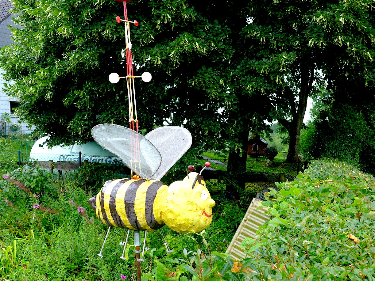 Этап "Ниренхоф-Фельберт" маркированного турмаршрута "Тропа Неандерланд", Северный Рейн-Вестфалия, Германия.